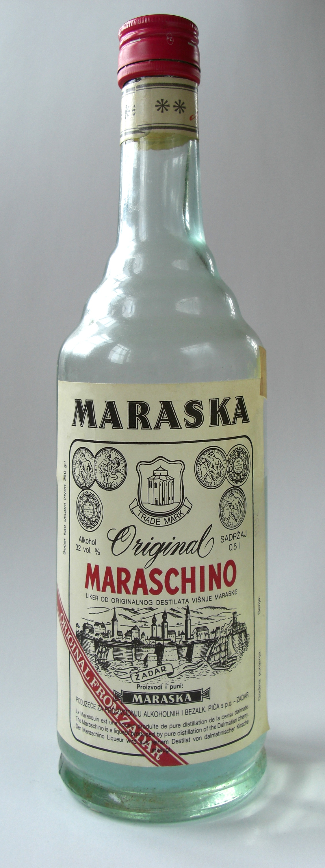 See title